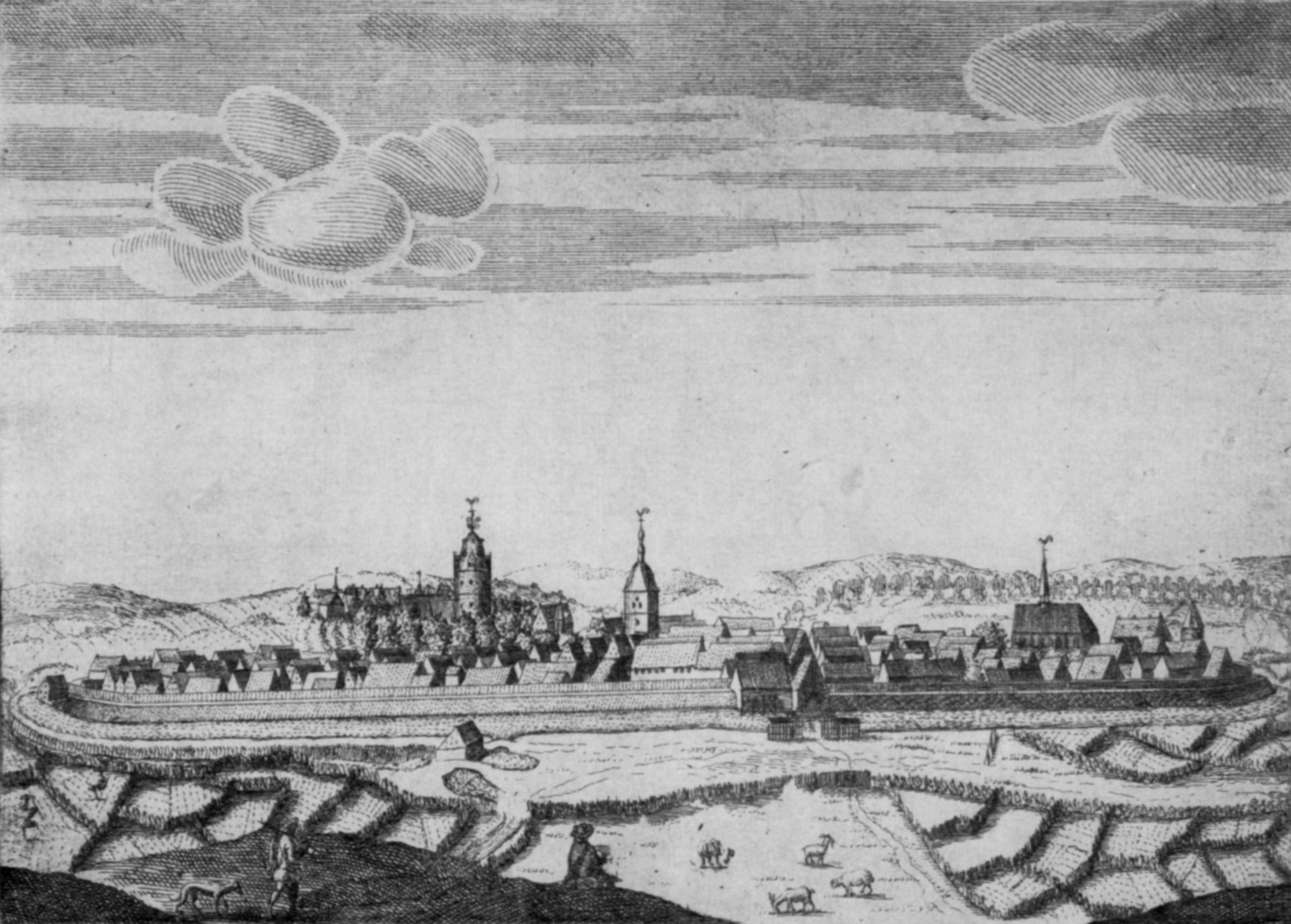 Südansicht von Detmold um 1664. Kupferstich von Elias und Heinrich van Lennep. Maße: 16,5 × 22,9 cm. Aufbewahrungsort: Detmold, Sammlung: Schlossmuseum.